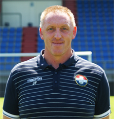 Foto gemaakt tijdens de persdag seizoen 2012-2013.